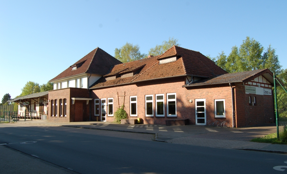 Ansicht des alten Bahnhofs von Zeven